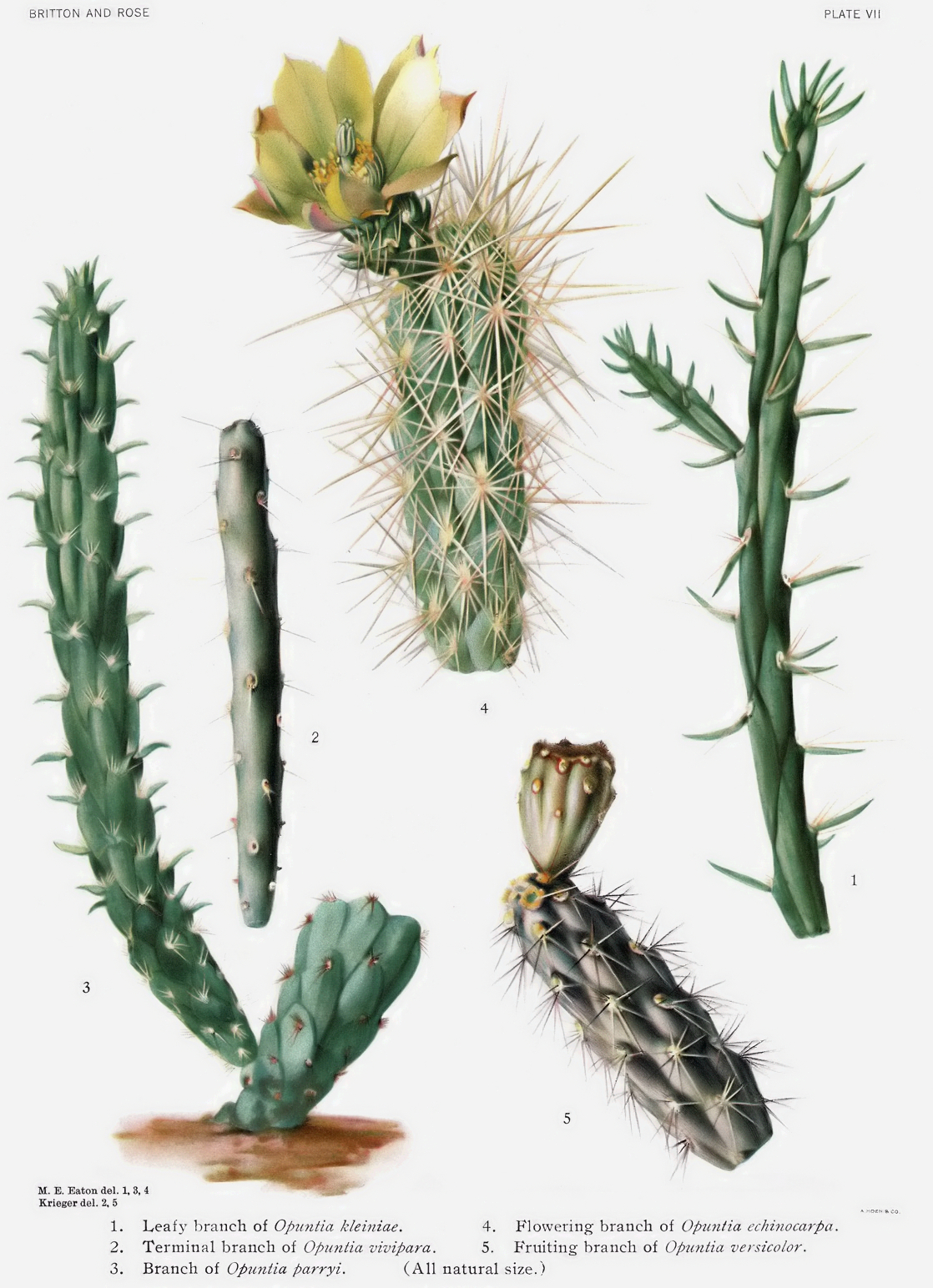 1. Cylindropuntia kleiniae, 2. Cylindropuntia vivipara, 3. Cylindropuntia californica, 4. Cylindropuntia echinocarpa, 5. Cylindropuntia versicolor.